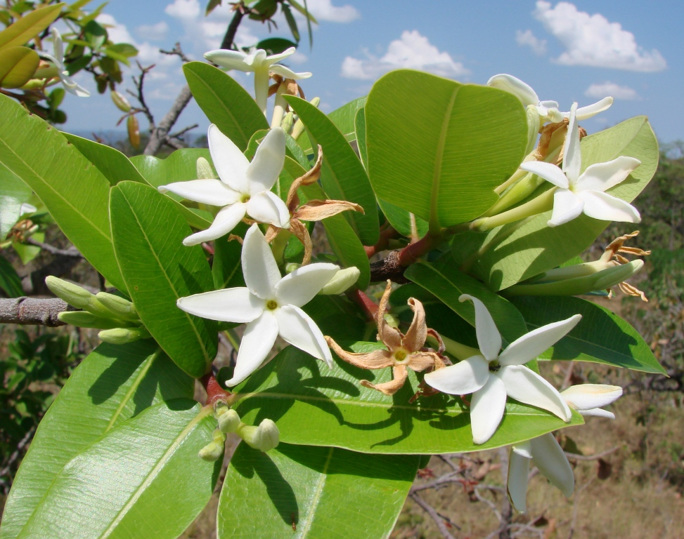 Hancornia speciosa - APOCYNACEAE - Jardim Botânico de Brasília - DF - Brasil